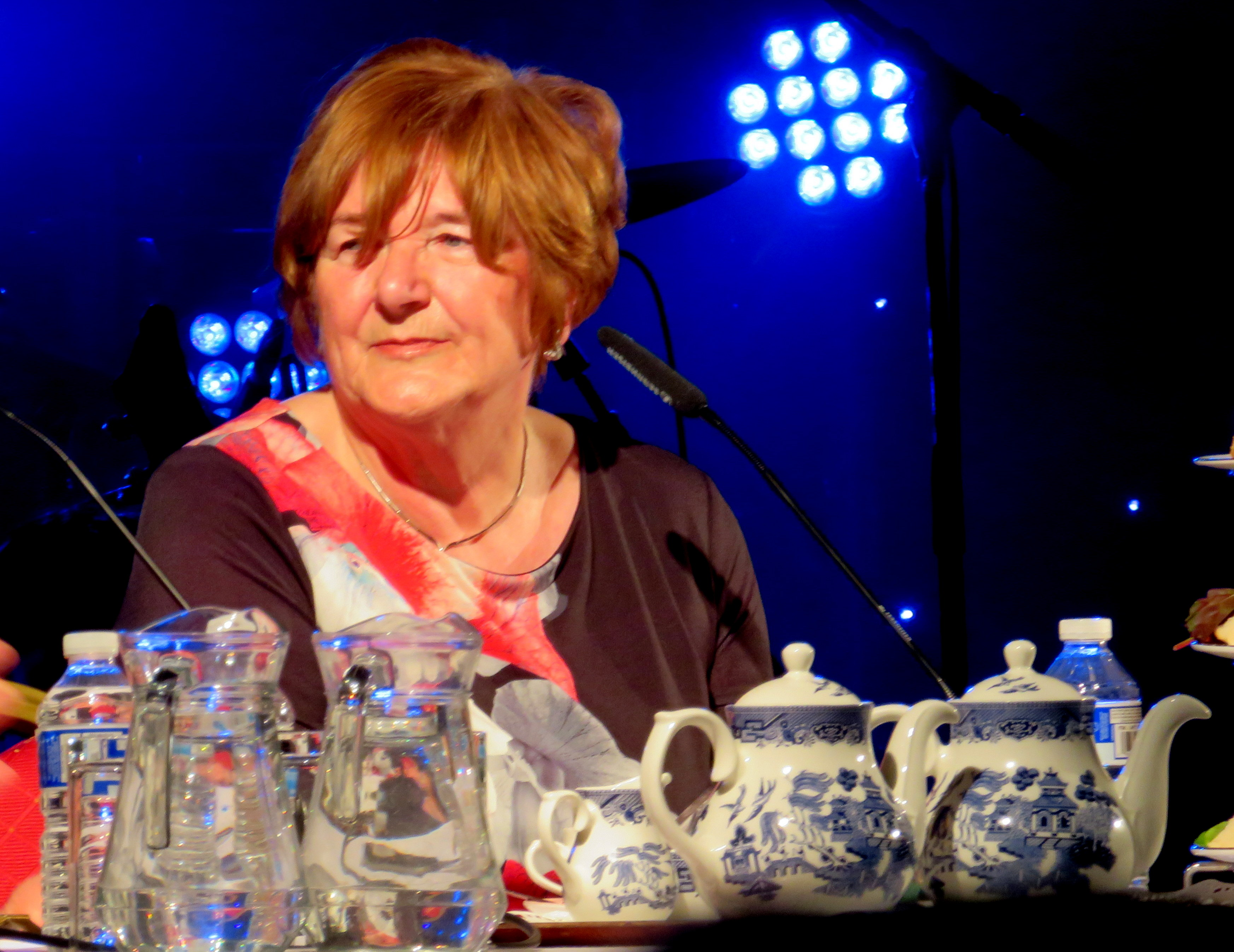 The Beatles Secretary